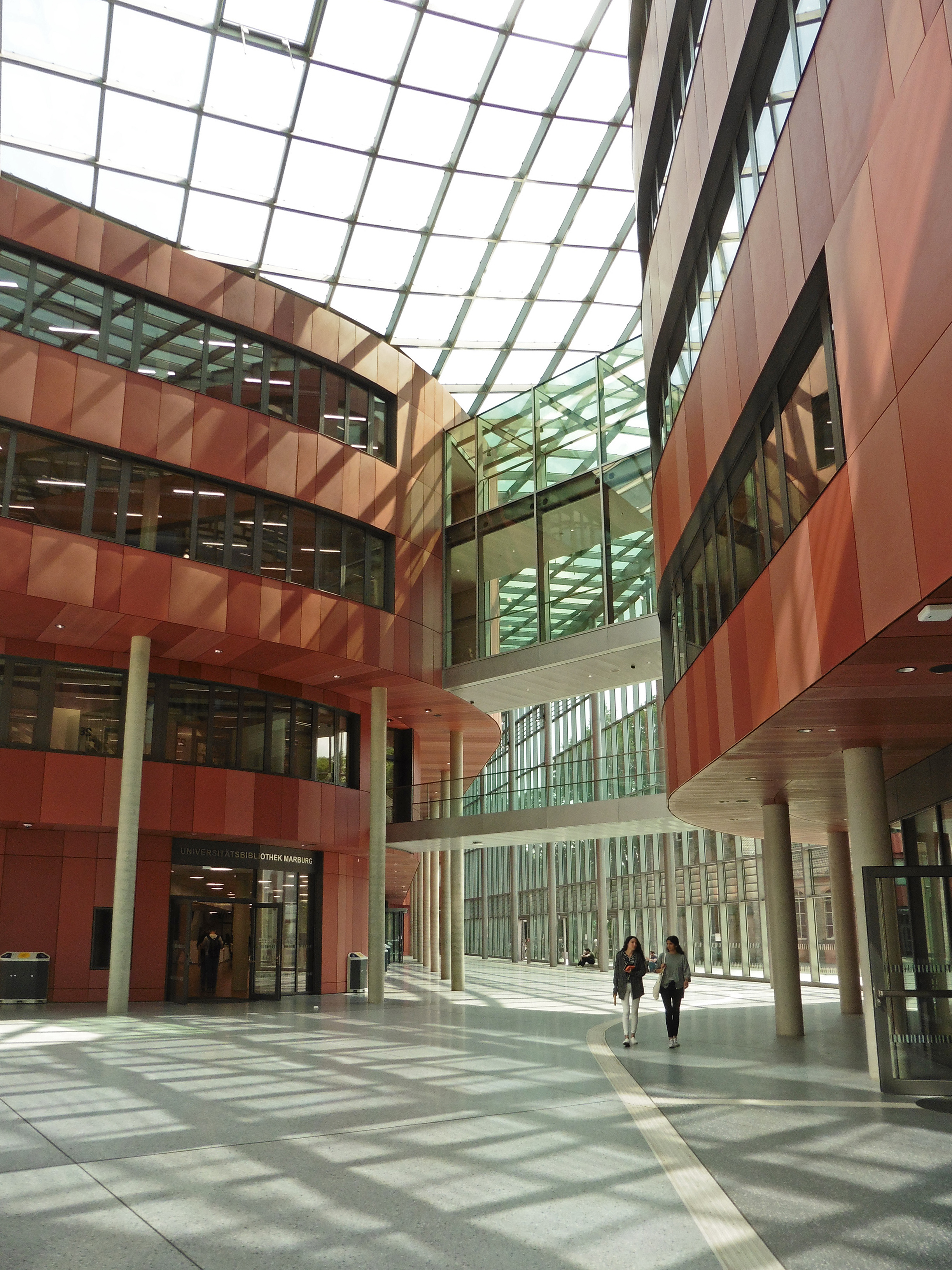 Neubau der Universitätsbibliothek in Marburg, Atrium Eingang Deutschhausstraße. Ansicht von Westen.